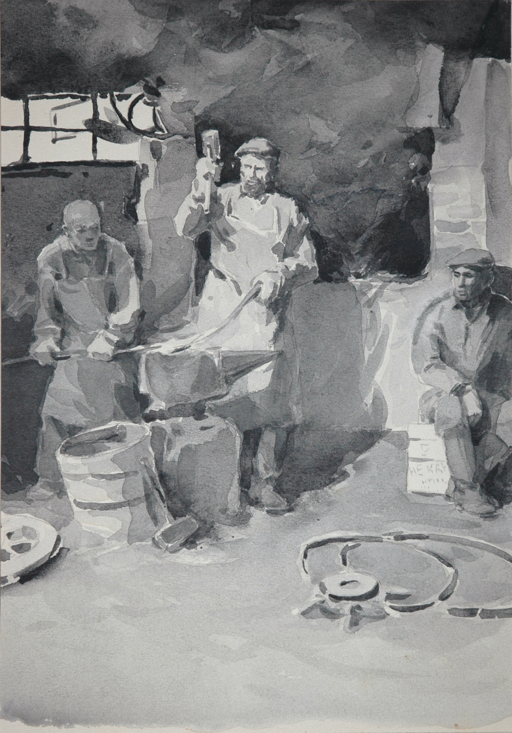 Художник Анатолий Викторович Борисов (1933–1969). Дипломная работа. Иллюстрации и оформление книги «Крутые горы» Н.Е. Вирты. 1960. Собрание Михаила Тренихина